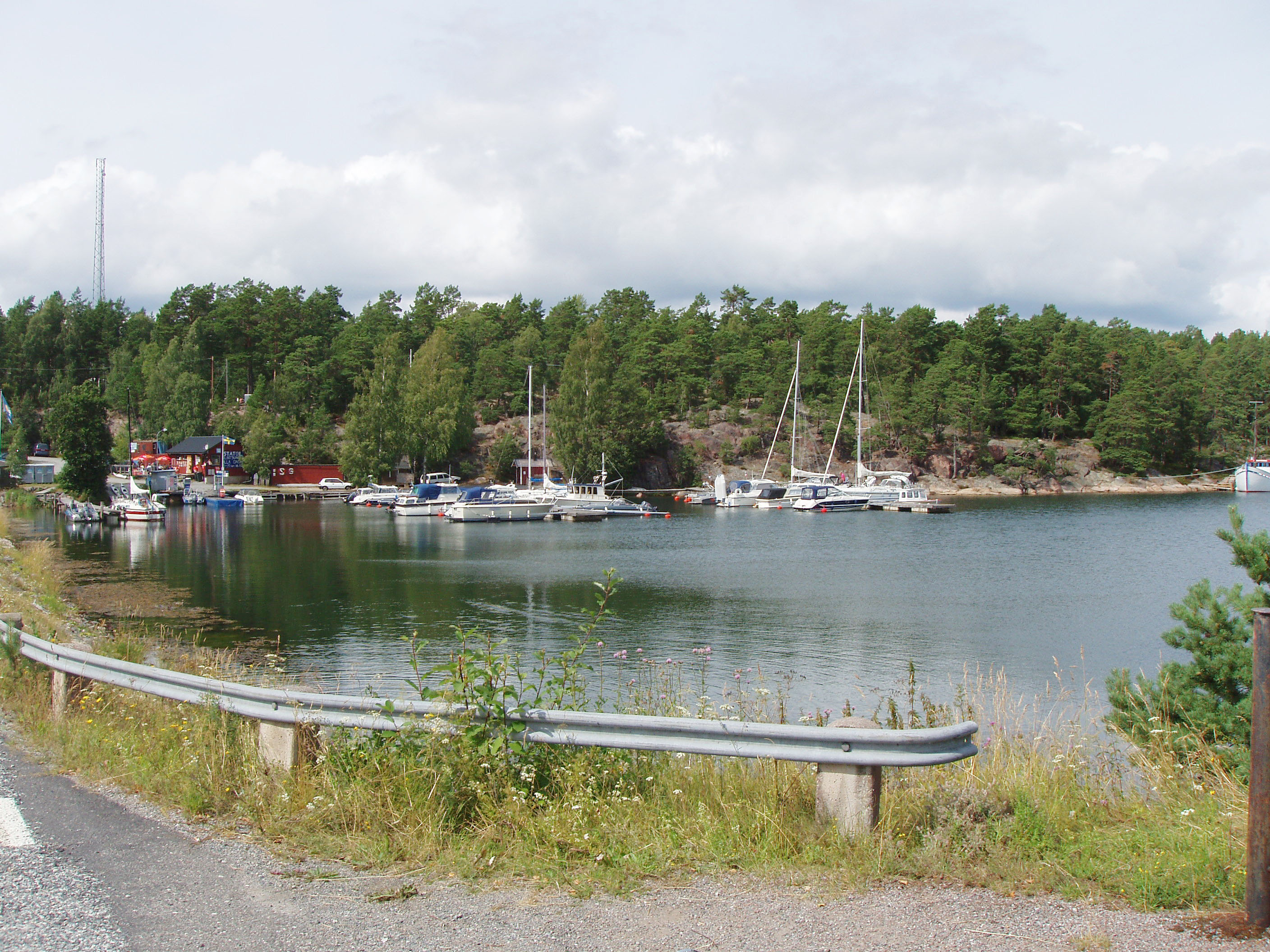 Klintsundets gästhamn med sjöbränslestation. Ljusterö, Österåkers kommun.